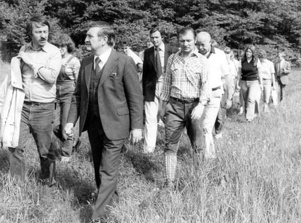 Die Klasse 10e der Kreisrealschule Merzig besucht am 21. Mai 1981 das Schutzgebiet in Dirmingen (vorne rechts Dr. Rainer Wicklmayr, ehemals Vorsitzender der NLS, hinten rechts Karl-Heinz Unverricht, ehemals Kurator der NLS. Anmerkung: Gemeint ist vermutlich das Landschaftsschutzgebiet "Dirmingen – alte Ziegelei" im Landkreis Neunkirchen, L 4.01.07. Das LSG wurde allerdings erst 1988 eingerichtet.